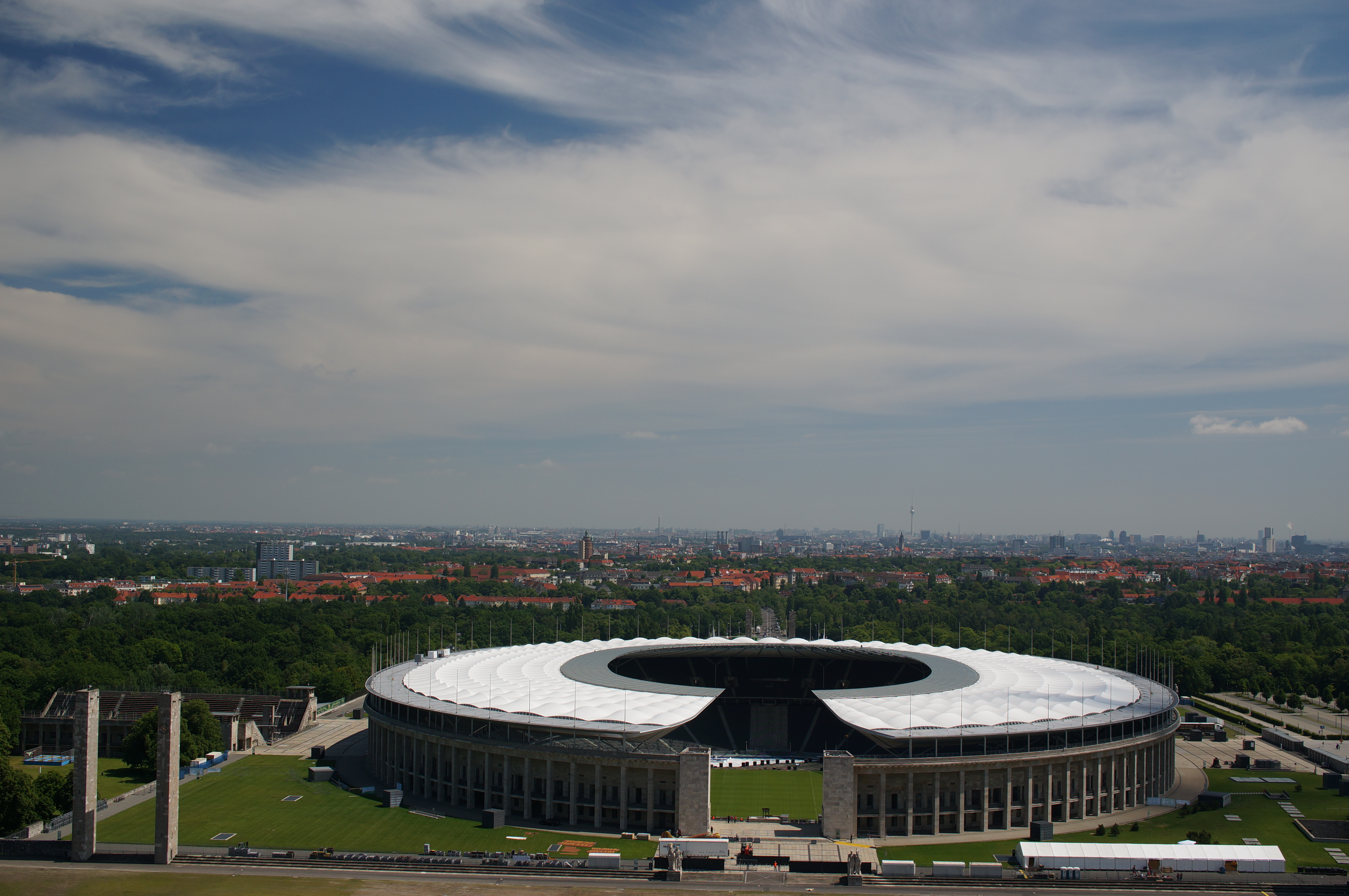 Olympiastadion